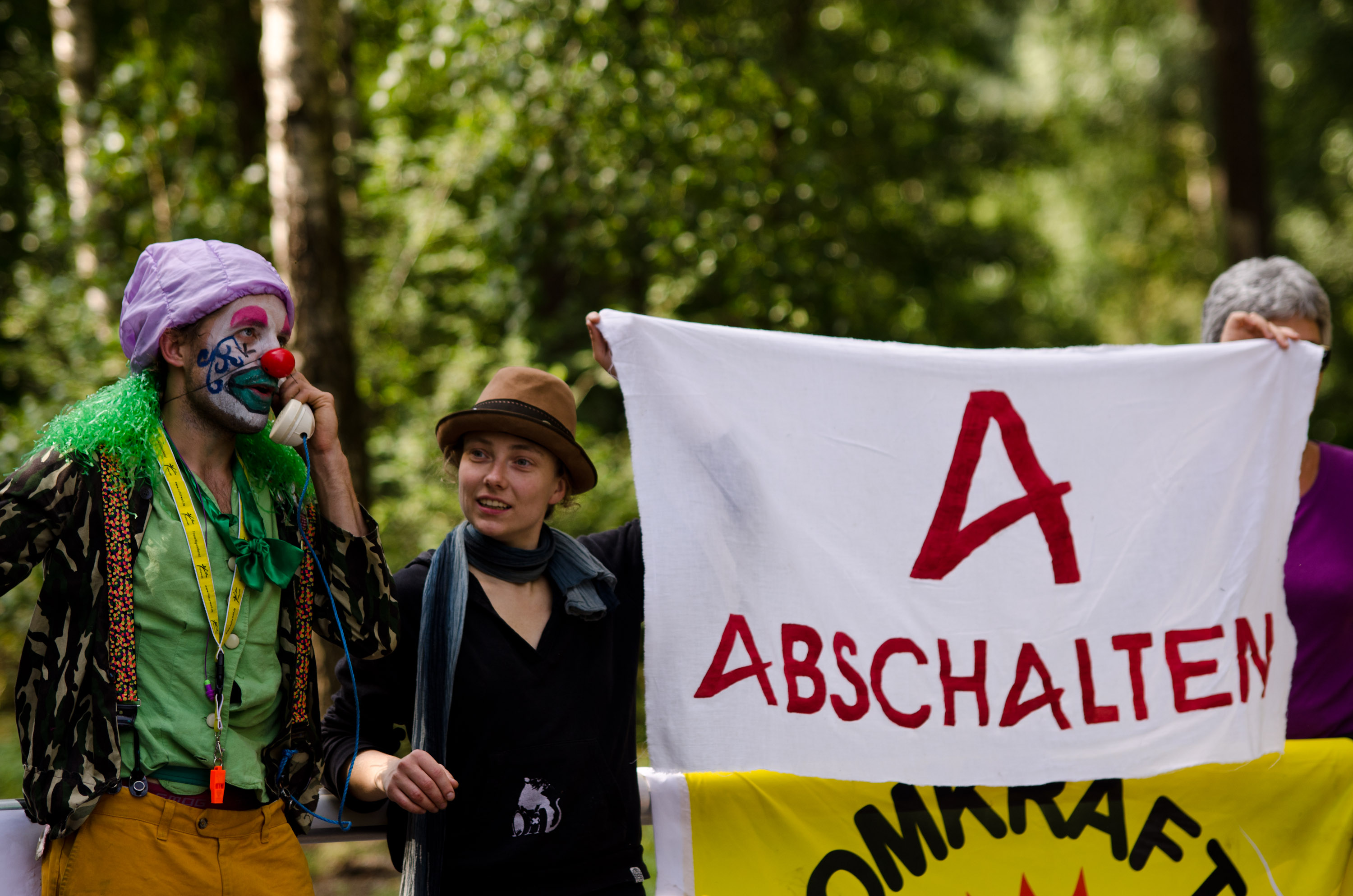 Die Umweltaktivistin Hanna Poddig (2.v.l) im Jahr 2013 bei einer Blockade der Areva-Brennelementefabrik in Lingen